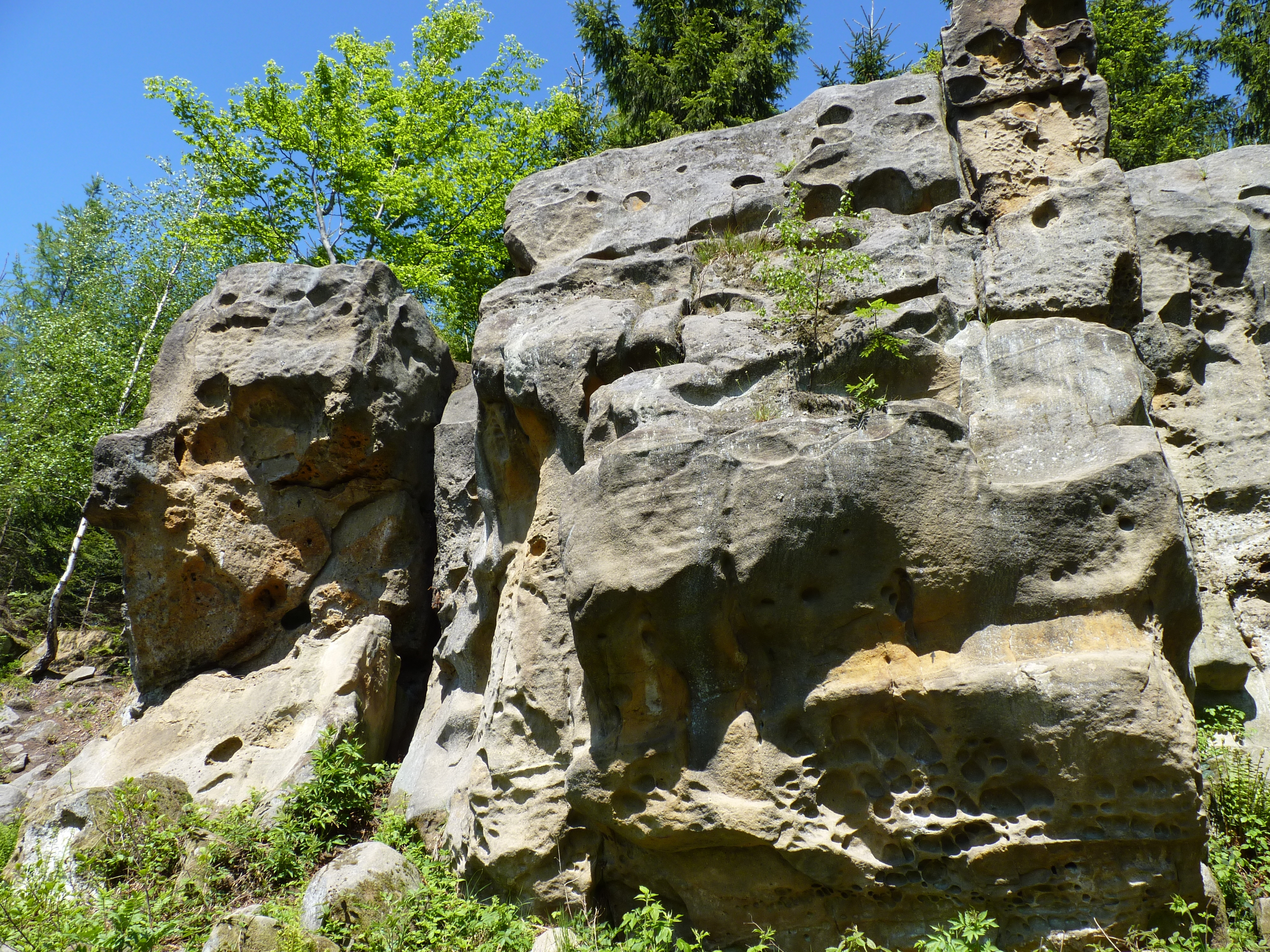 Horní lačnovské skály, Vizovická vrchovina,okres Vsetín, Zlínský kraj